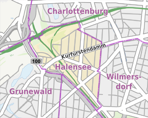 Übersichtskarte der Straßen und Ortslagen in Berlin-Halensee